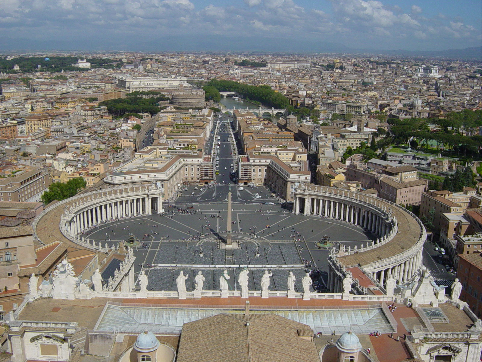 Pohled z Baziliky Sv. Petra